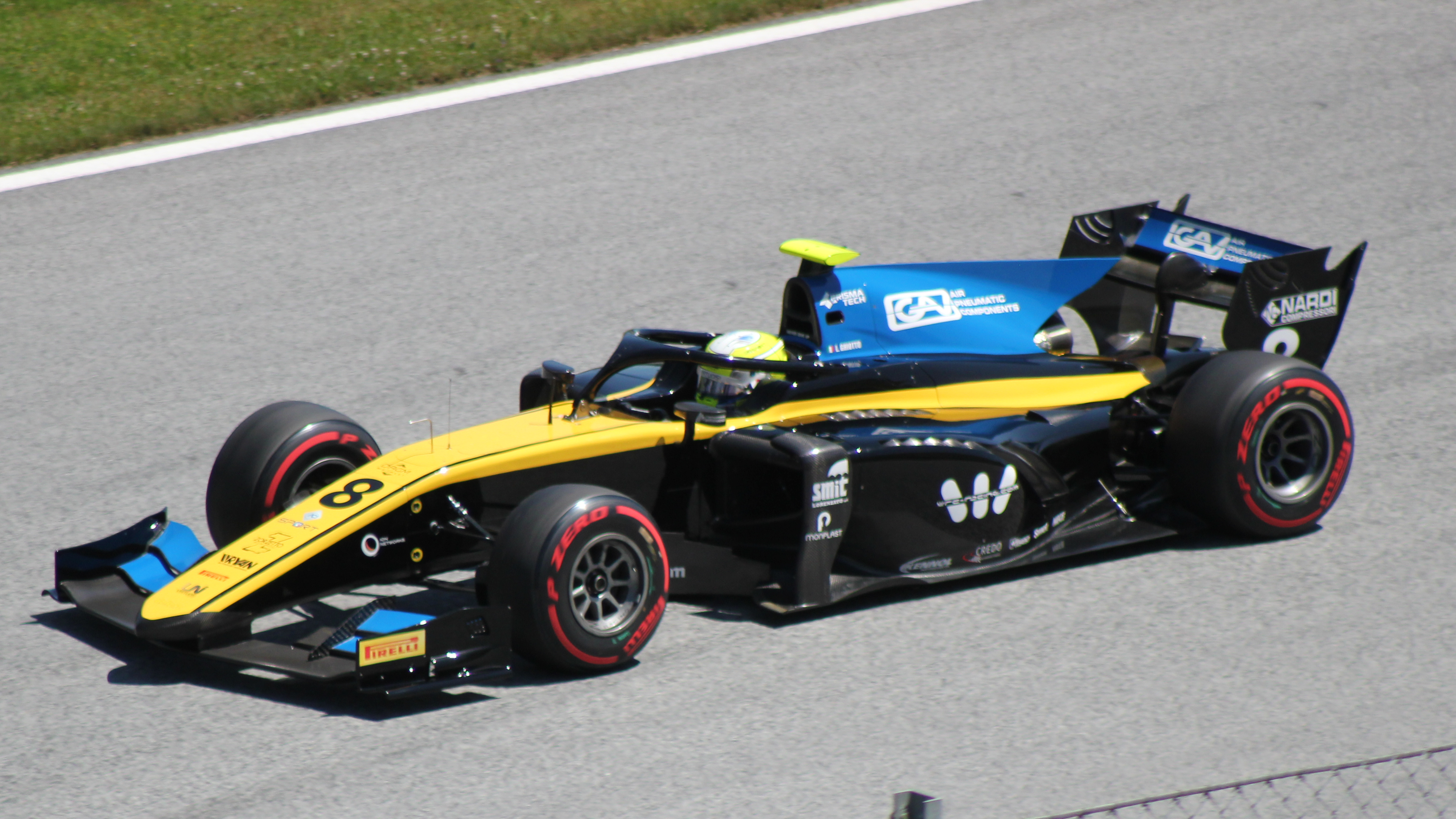 Ghiotto beim Rennwochenende in Österreich 2019